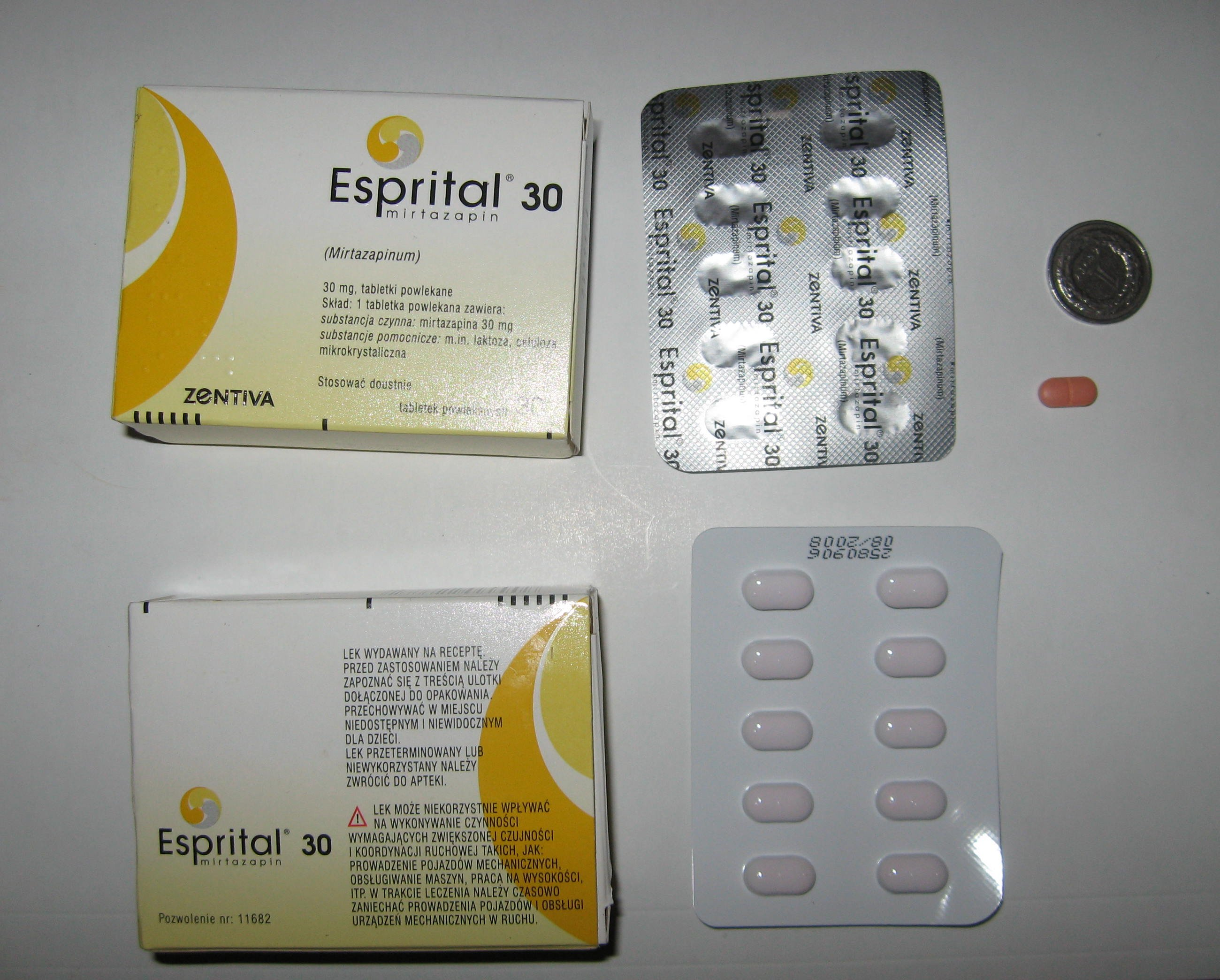 Esprital oraz złotówka jako skala